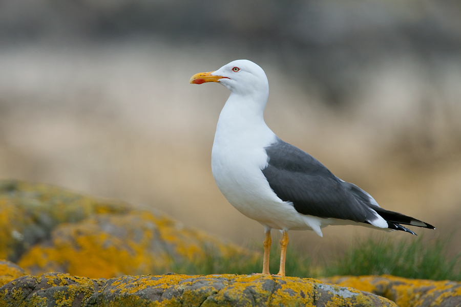 Larus fuscus